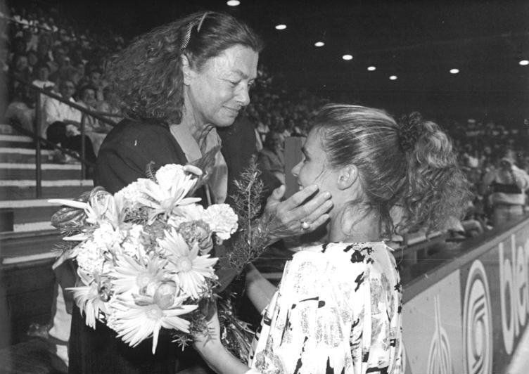 Katarina Witt, Jutta Müller ADN-ZB Thieme 11.9.1988 Karl-Marx-Stadt: Eiskunstlauf.- Die zweimalige Olympiasiegerin Katarina Witt wurde bei einem Schaulaufen in ihrer Heimatstadt Karl-Marx-Stadt vom Leistungssport verabschiedet. In der mit nahezu 5.000 Eissportfreunden ausverkauften Sporthalle "VIII. Parlament" wurde die 22jährige Schauspiel-Studentin noch einmal begeistert gefeiert. Bewegende Augenblicke zum Abschluß einer glanzvollen Sportlerlaufbahn zwischen Trainerin Jutta Müller und Katarina Witt.